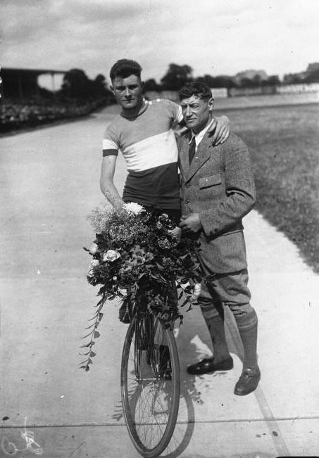 Souchard, vainqueur du Championnat de France